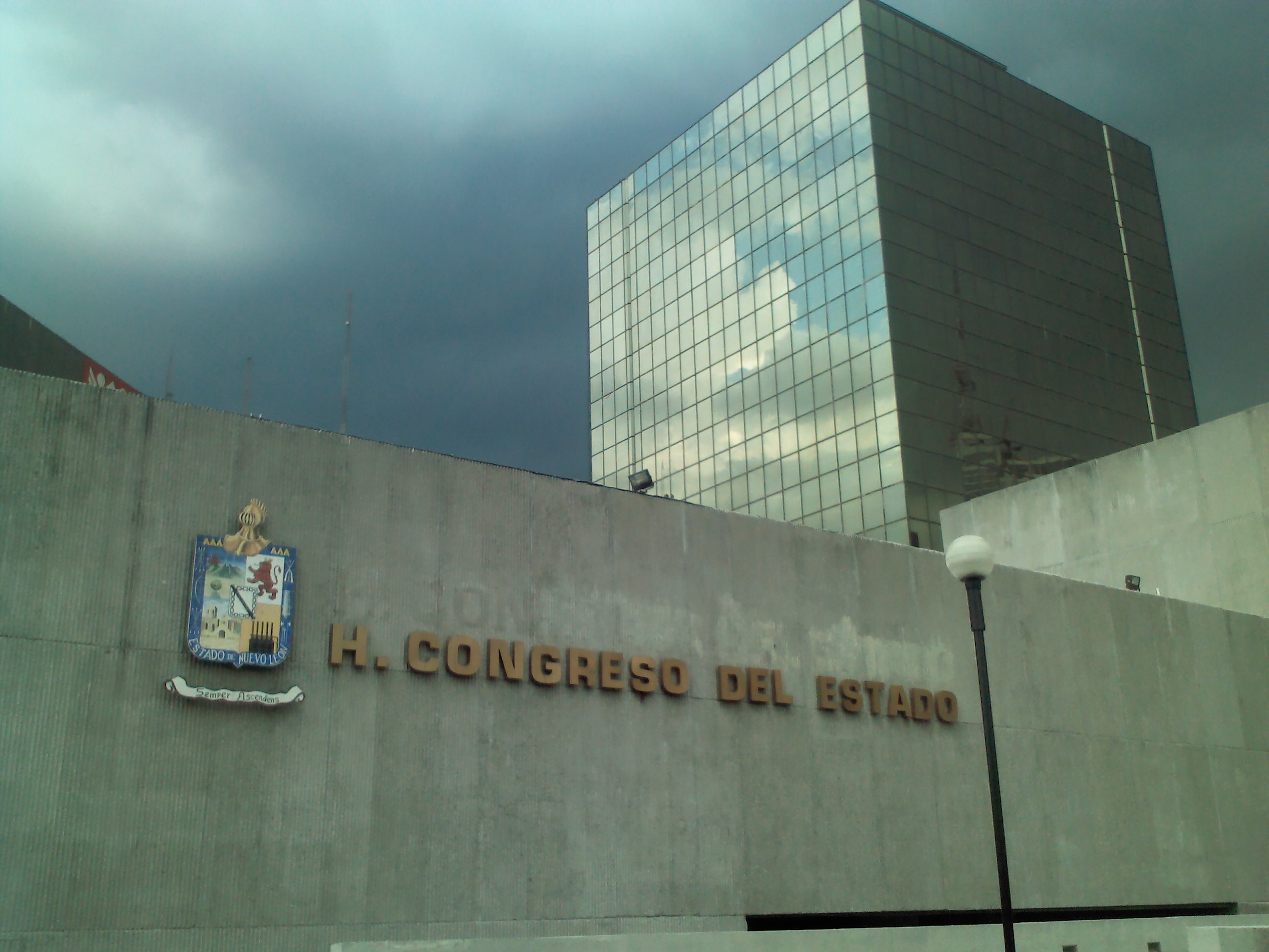 Congreso de Nuevo León